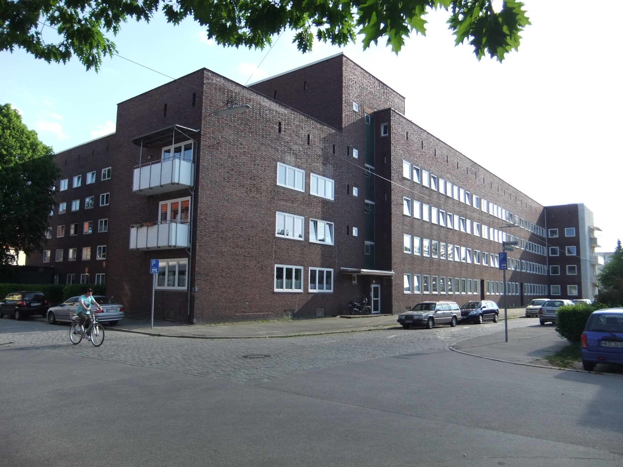 Wohnanlage "Werkblock" in Bremerhaven, Werkstraße 14 . Die Gesamtanlage ist ein geschütztes Kulturdenkmal in der Freien Hansestadt Bremen, mit der Nr. 3177 beim Landesamt für Denkmalpflege registriert.